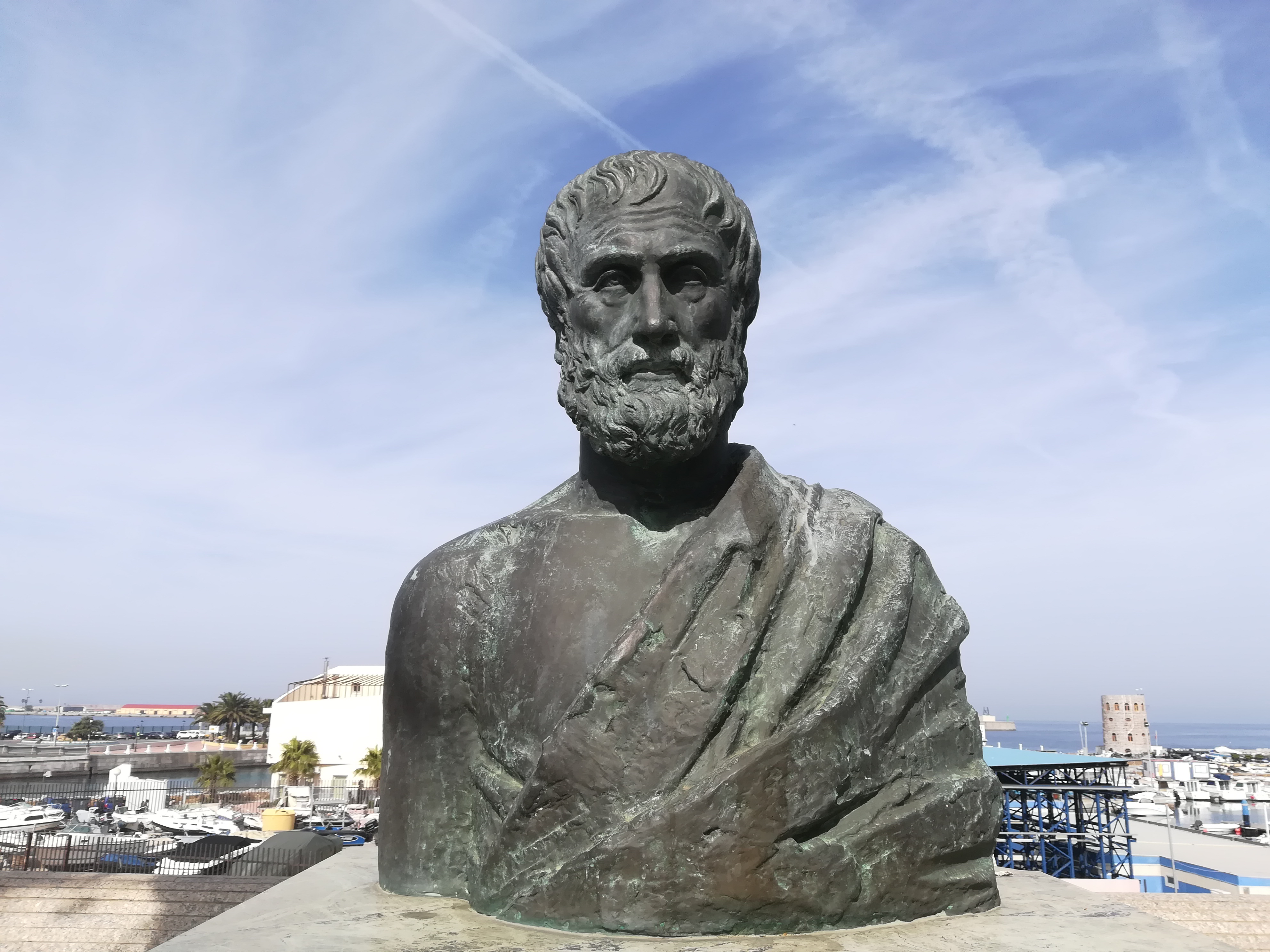 Aristóteles. Ceuta. España.